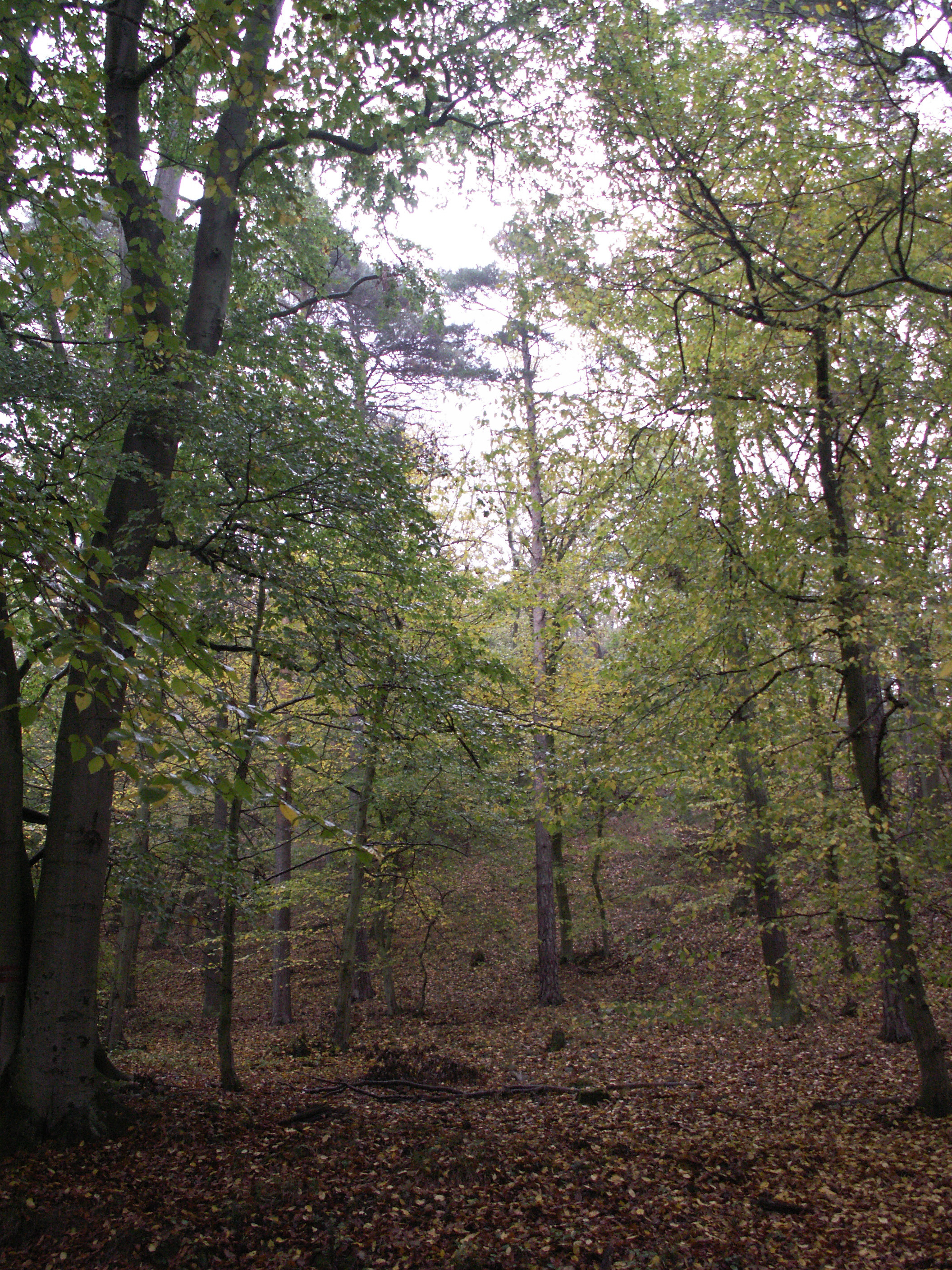 Přírodní rezervace Holé vrchy, k.ú. Lelekovice, okres Brno-venkov